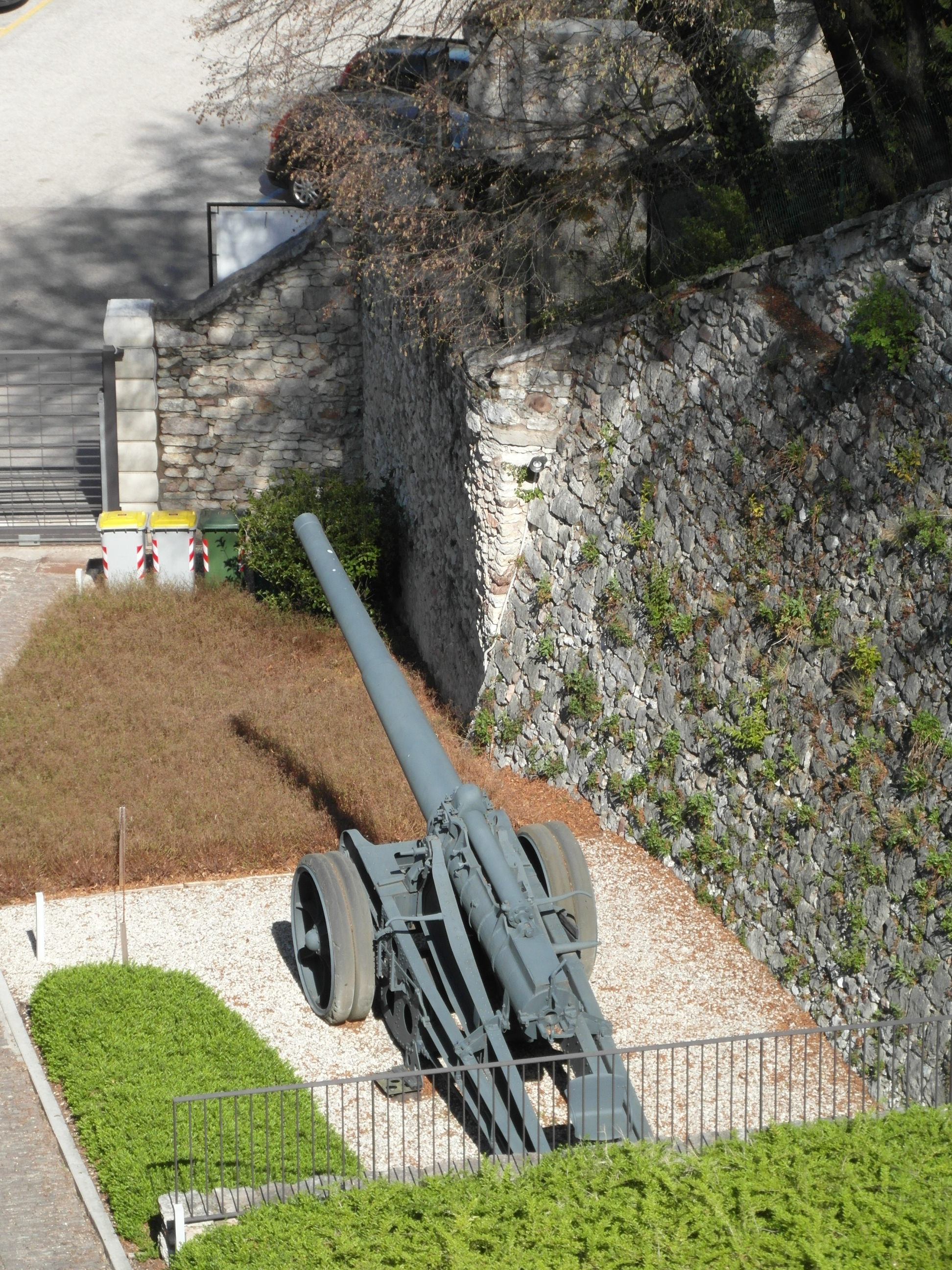 Cannone St Chamond 155 mle 1916 Rovereto